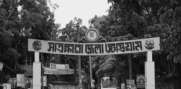 সাতক্ষীরা স্টেডিয়ামের প্রবেশদ্বার।